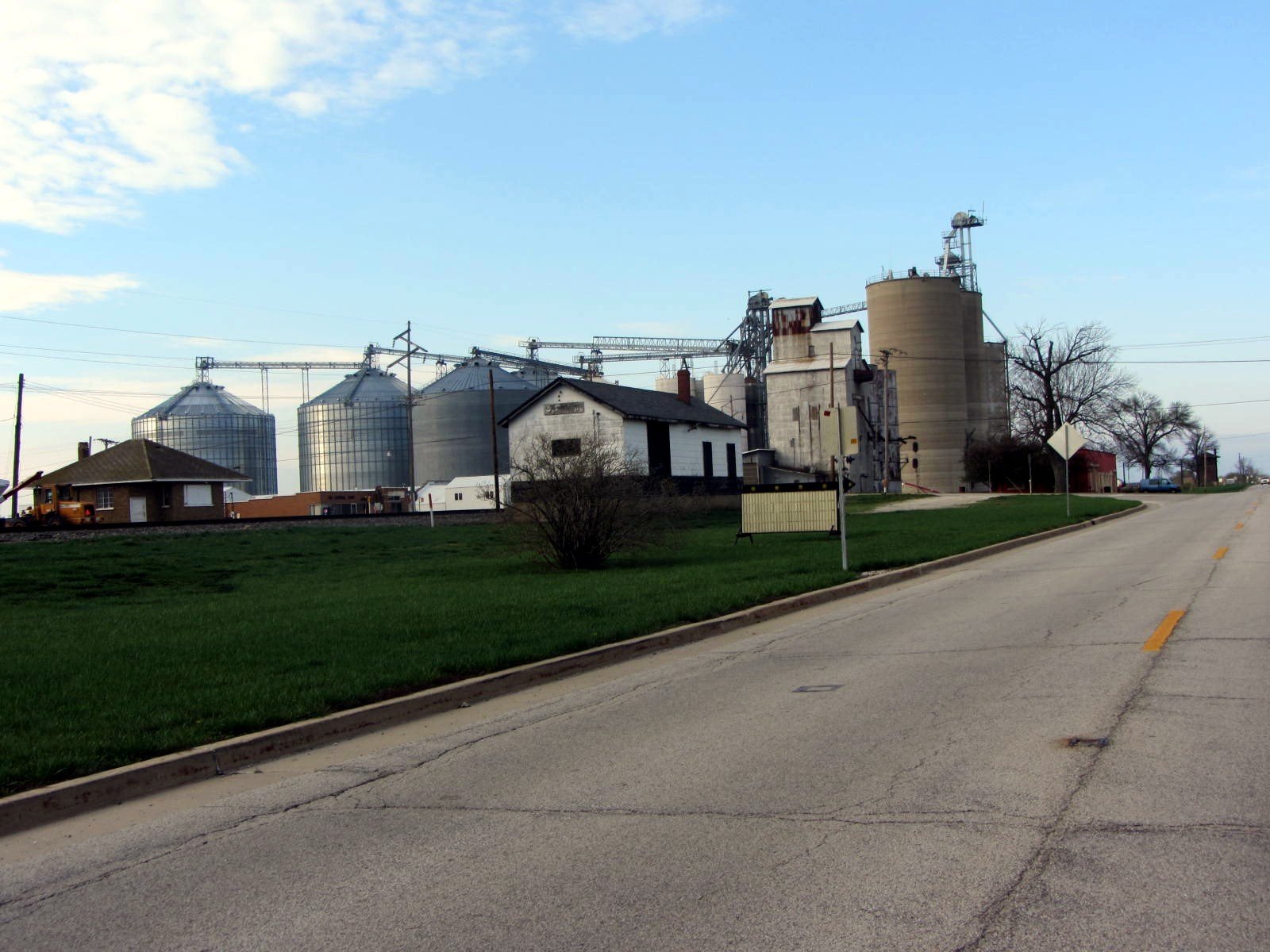 Ashkum, Illinois